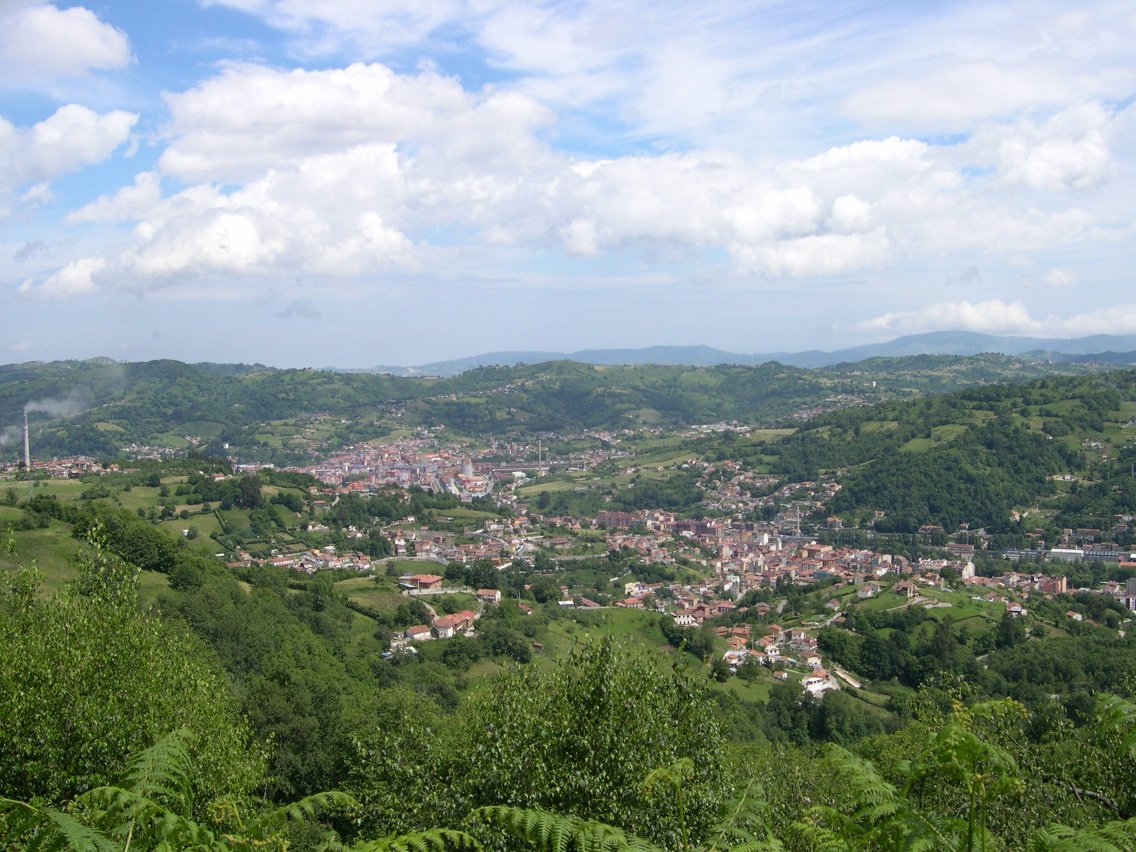 Valle Llangreu. Asturies